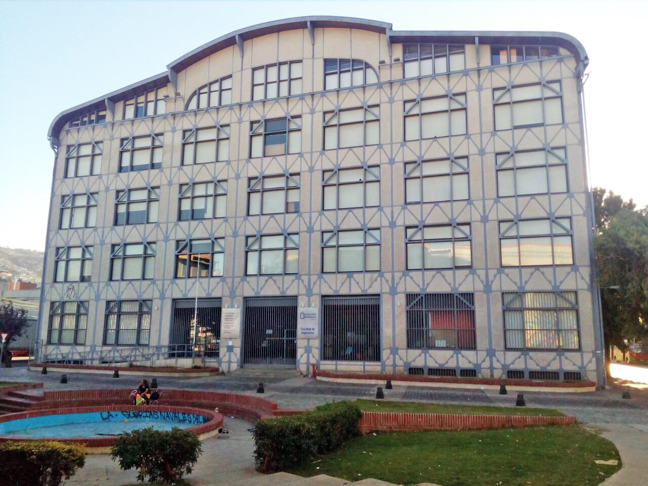 Facultad de Ingeniería de la Universidad de Valparaíso Carreras de Ingeniería Civil, Ingeniería Civil Biomédica, Ingeniería Civil Informática, Ingeniería en Construcción y Decanato. General Cruz 222, Valparaíso, Chile Antiguo Edificio de Chilquinta, antes Edificio de Fábrica Hucke.